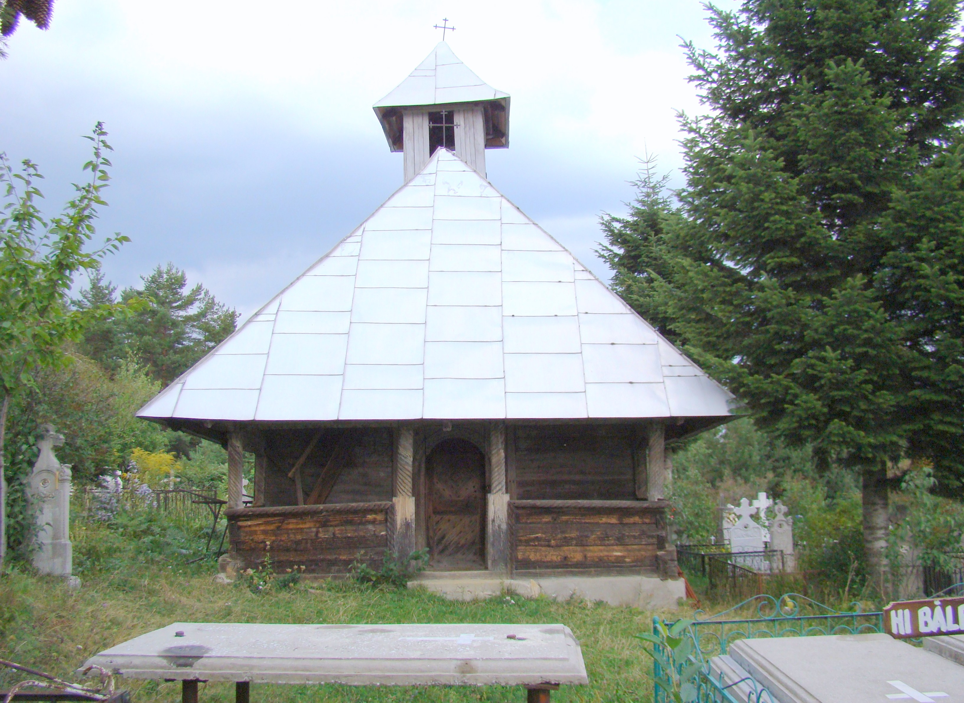 Biserica de lemn „Sf.Dumitru” din Schela-Cornet, județul Gorj